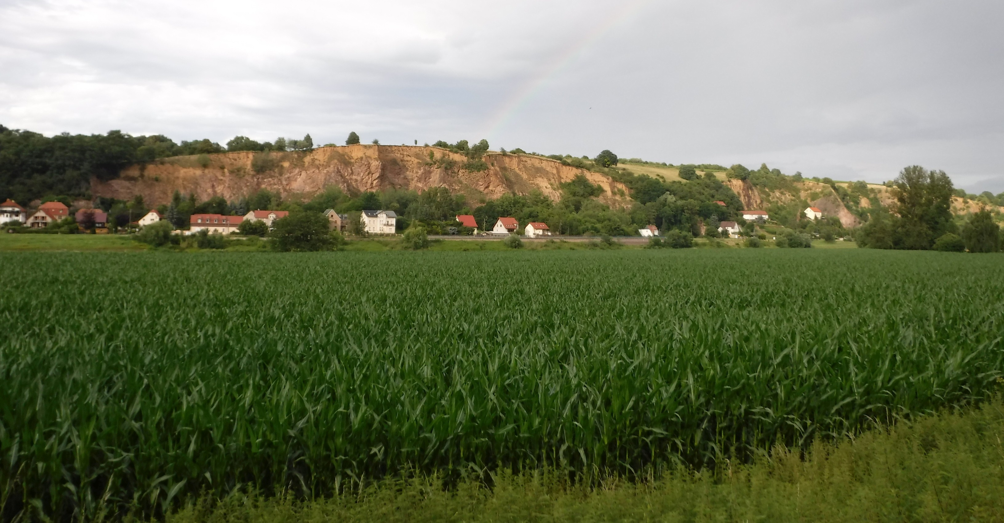 Einzelgebiet 5 "Elbhänge bei Karpfenschänke" des Fauna-Flora-Habitat-Gebiets "Bosel und Elbhänge nördlich Meißen", Blick aus Keilbusch, 01665 Diera-Zehren